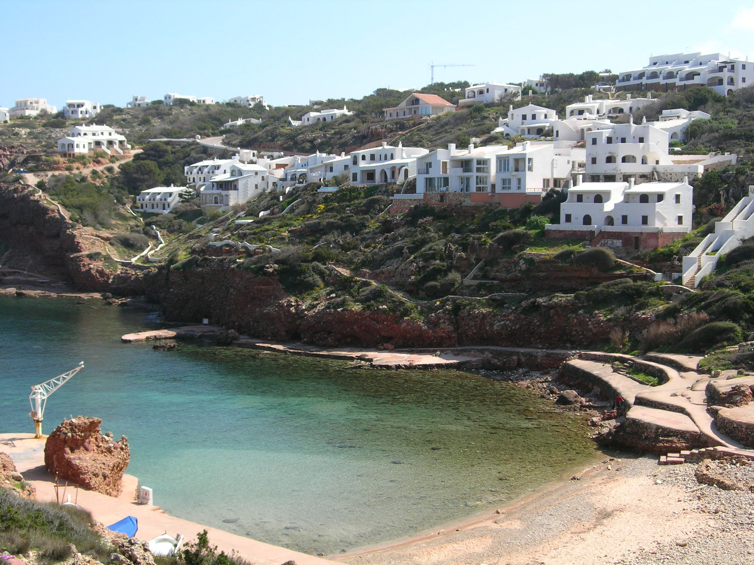 Cala Morell (Ciutadella) This is a a photo of a beach in the Balearic Islands, Spain, with id: PL-IB-76020